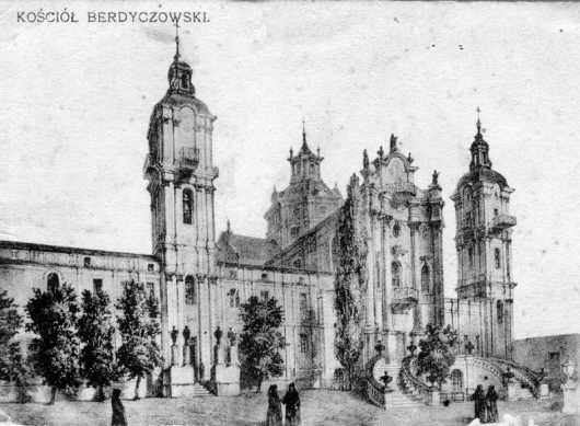 Надземный костел в Бердичеве